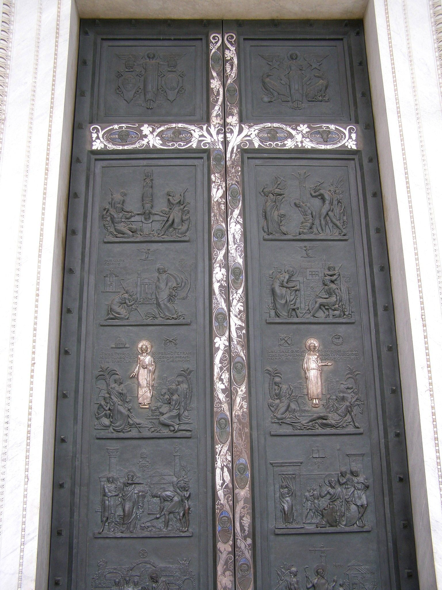 Hlavná brána baziliky a reliéfmi zo života a martýria svätých Petra a Pavla. Pochádza z rokov 1929 - 1931